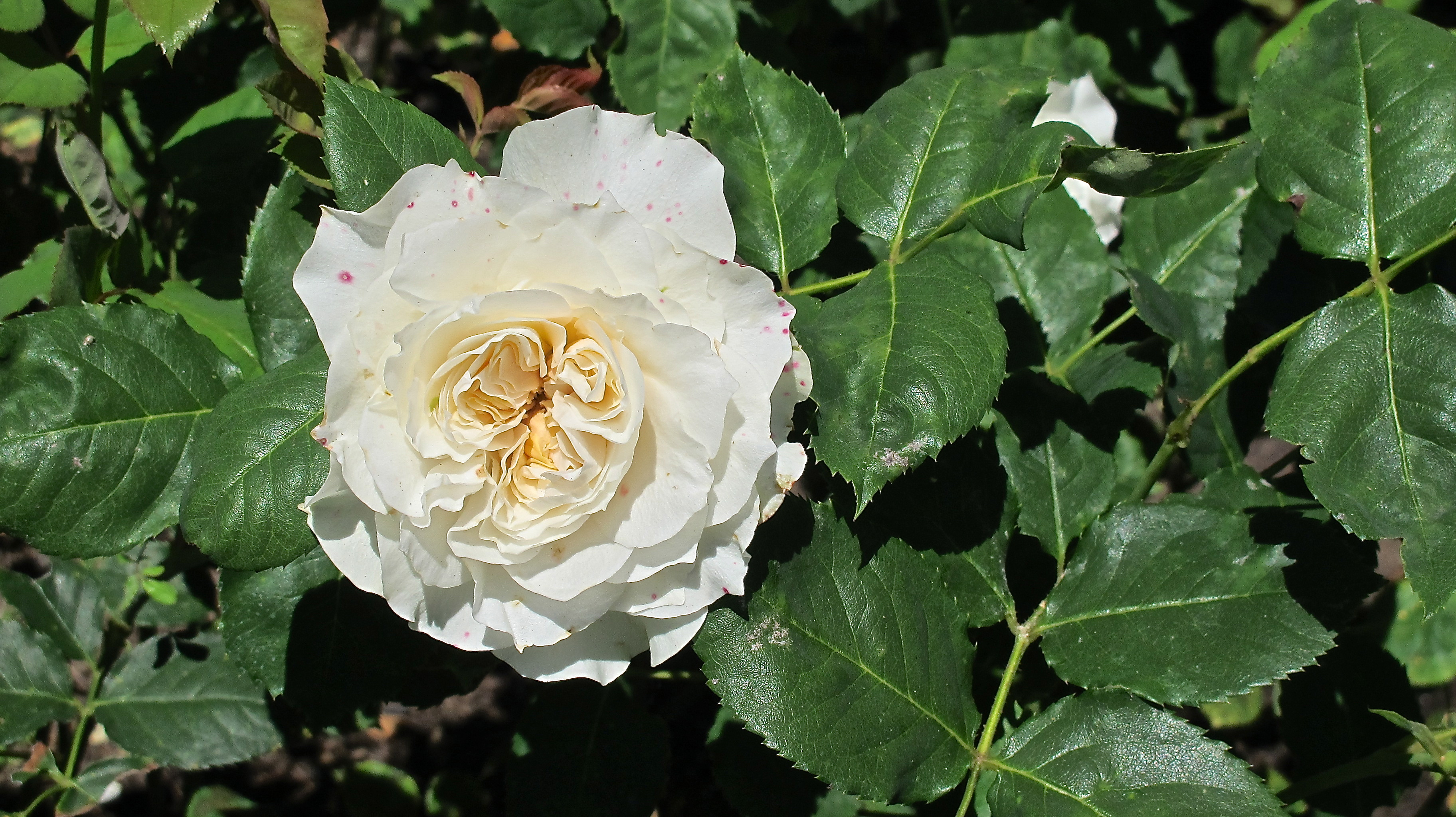 Swan Rose